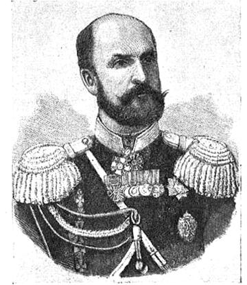 генерал від інфантерії